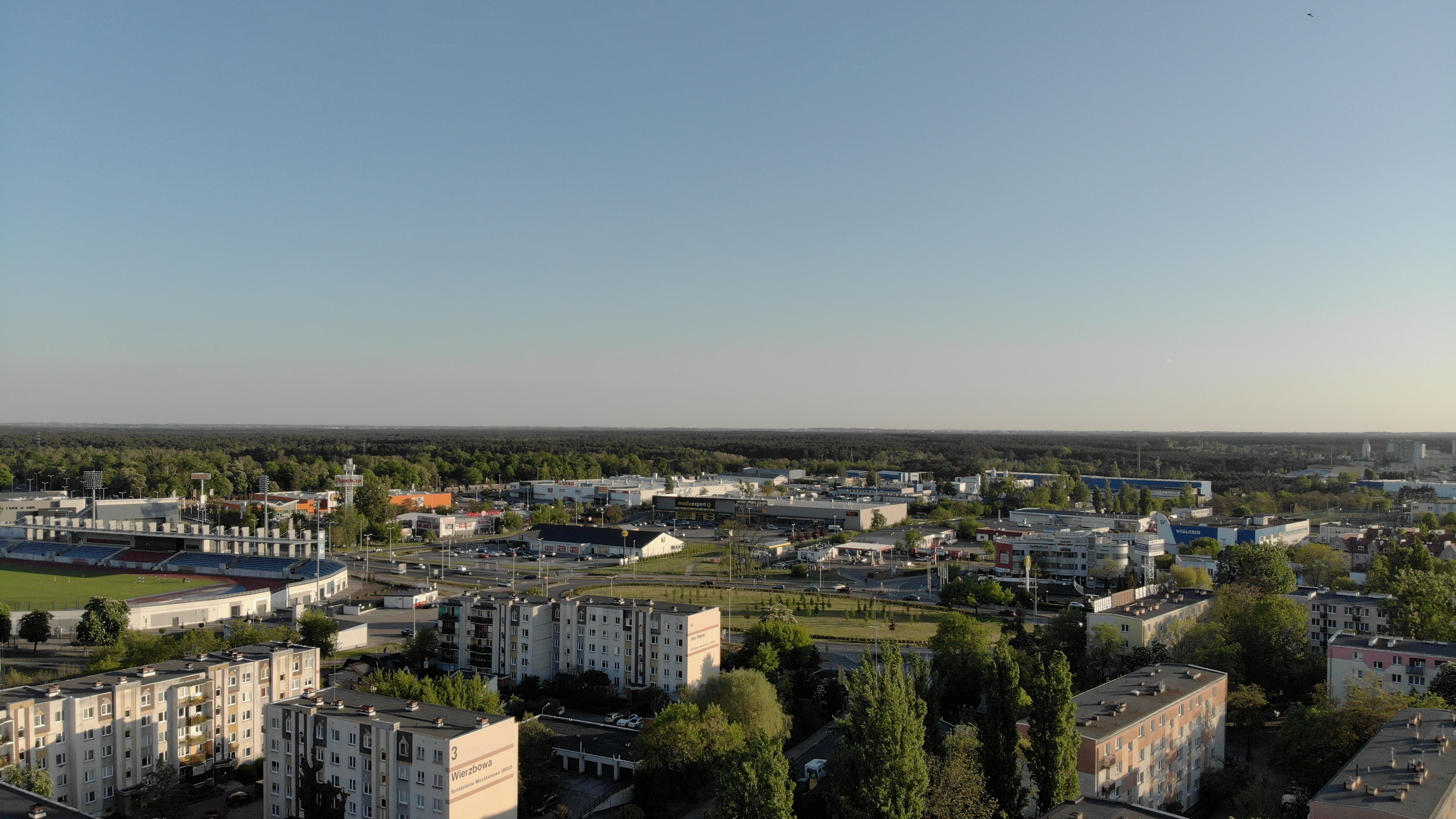 Styk Śródmieścia i Kazimierza Wielkiego (2020 r.)